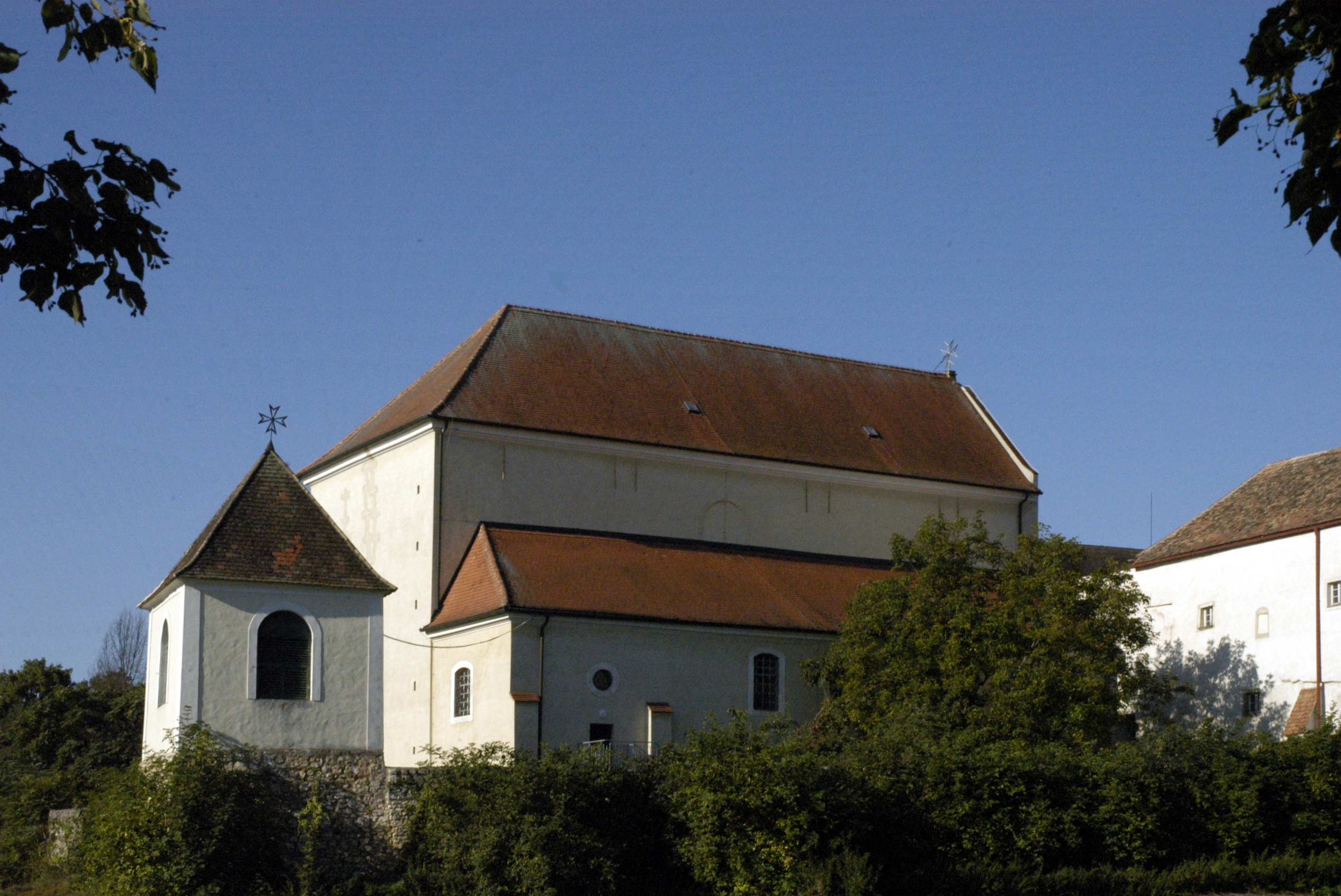 katholische Pfarrkirche, Schlosskirche heiliger Johannes der Täufer auf Schloss Mailberg